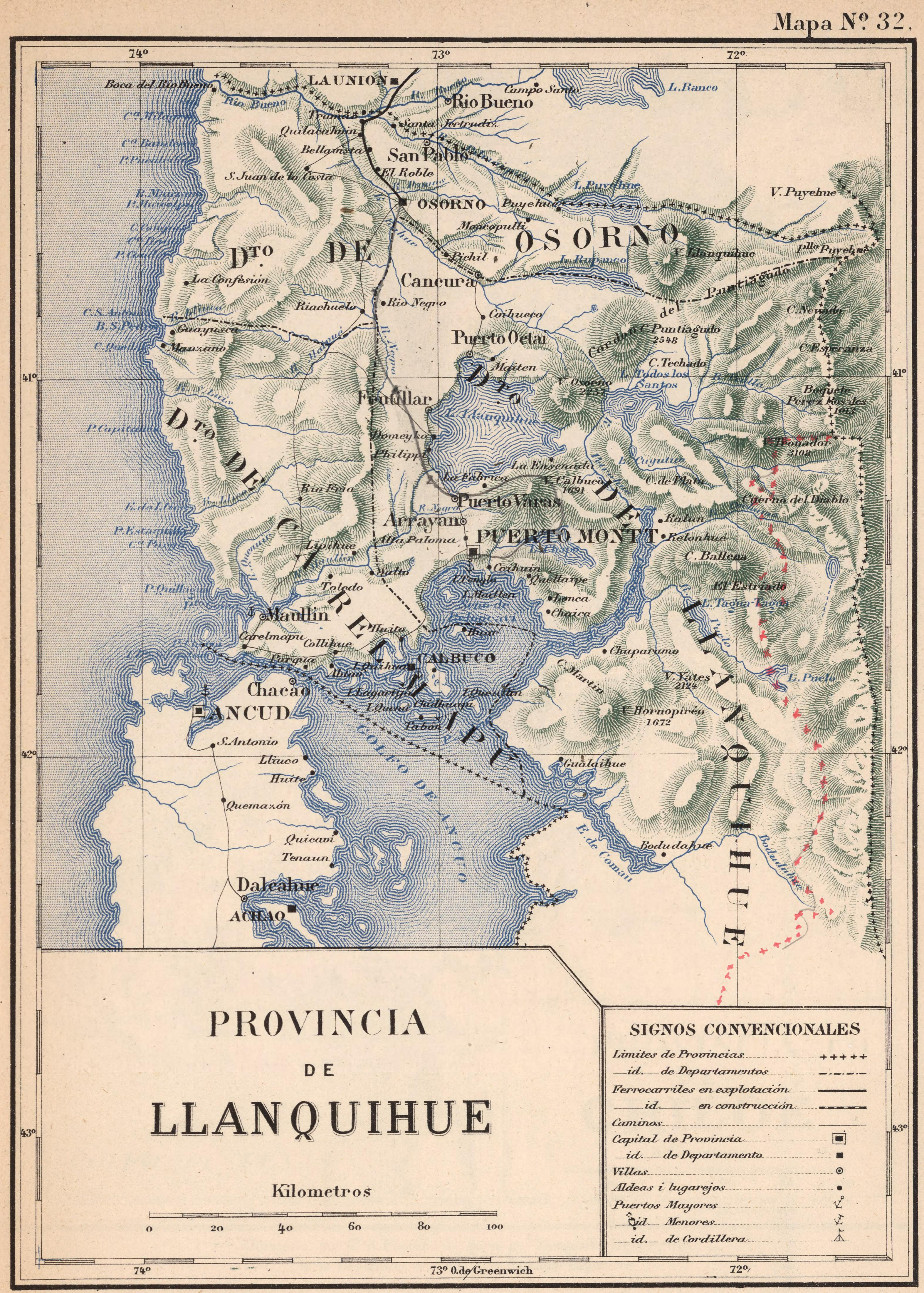 Atlas de Chile Arreglado para la Jeografia Descriptiva de la Republica de Chile por Enrique Espinoza.